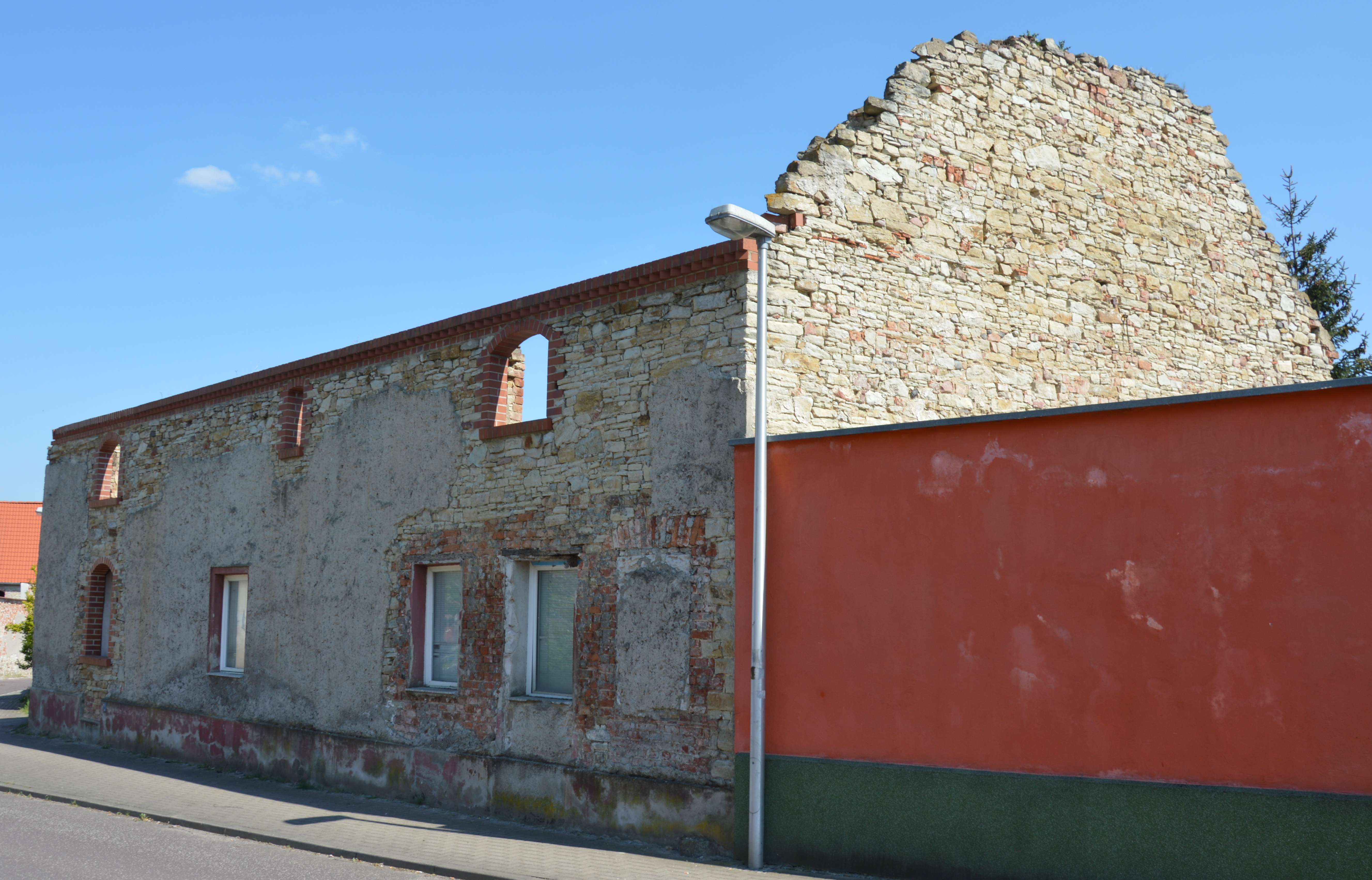 Haus Kieler Straße 9 in Magdeburg